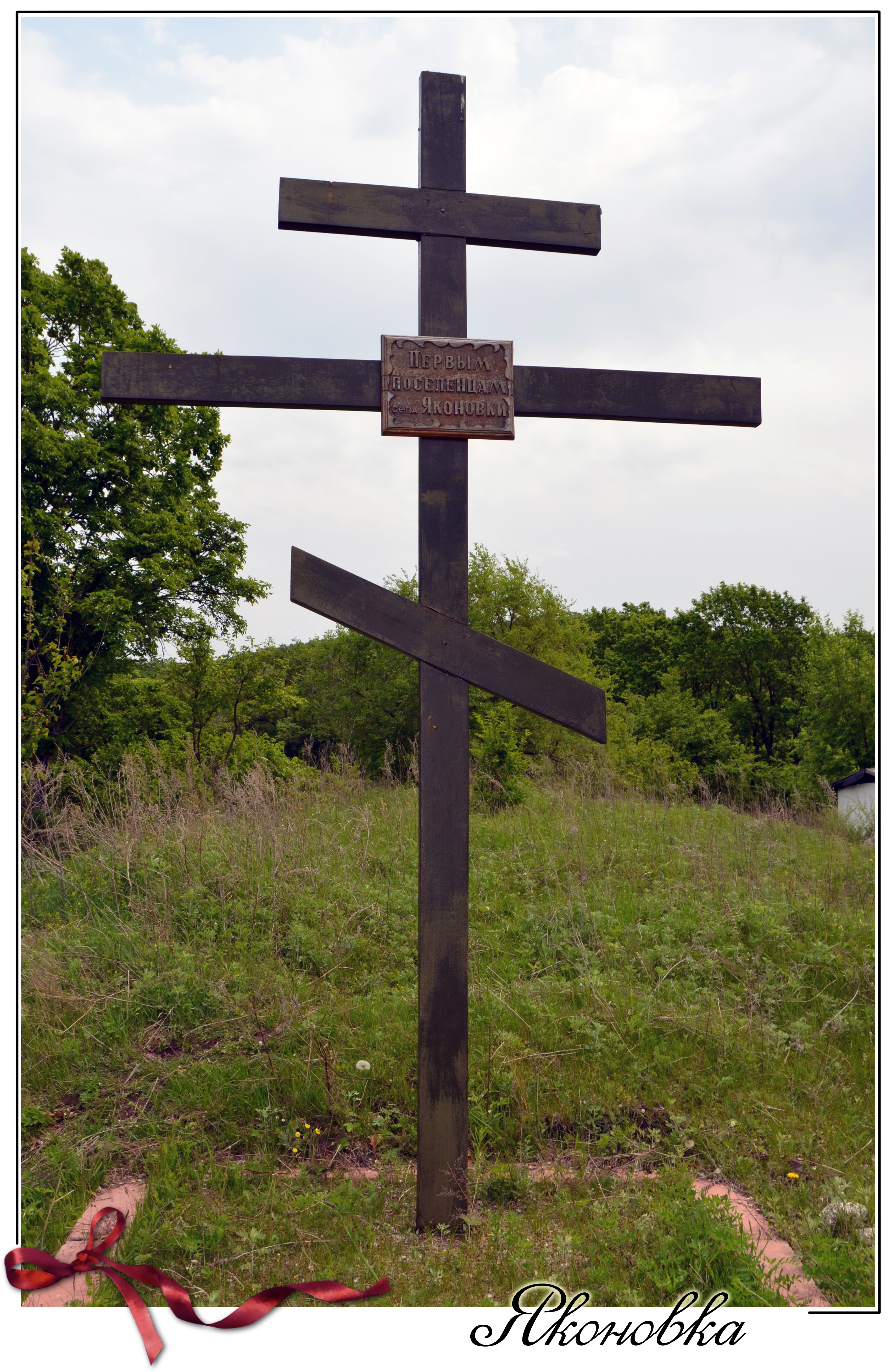 Крест основателям села.